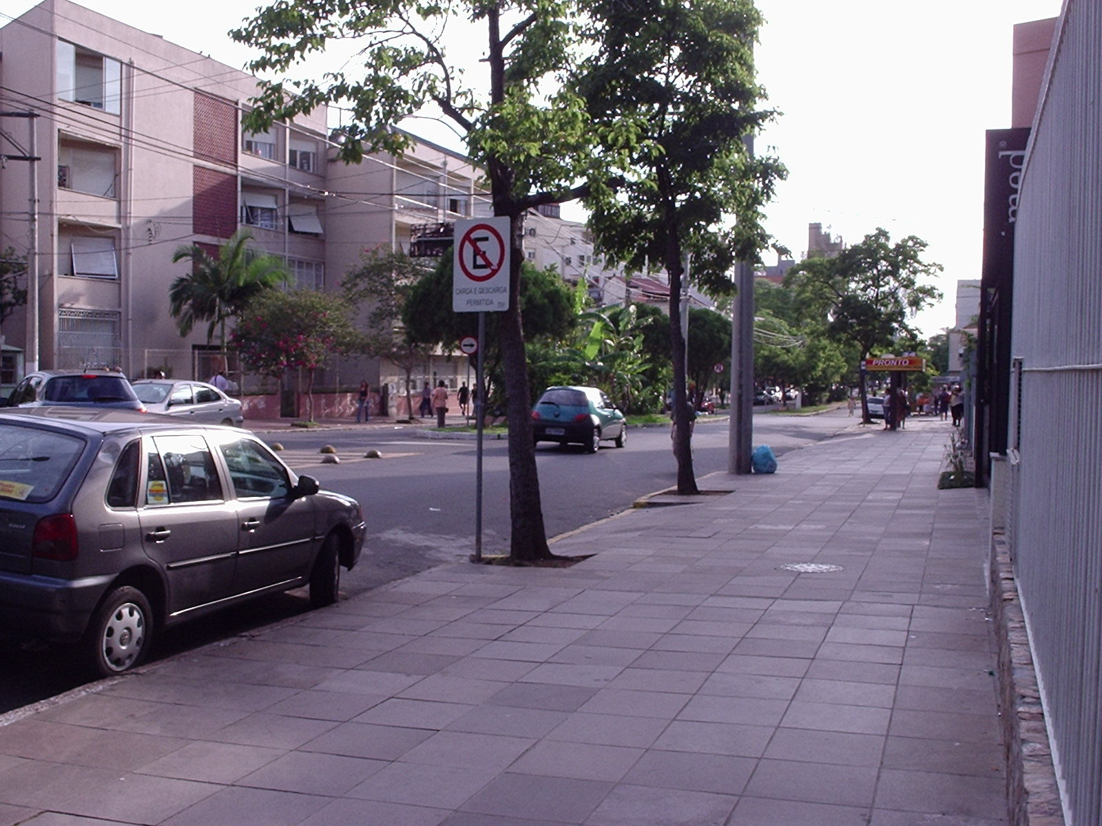 Aspecto do Bairro Santana, em Porto Alegre, Brasil. Avenida Jerônimo de Ornelas.